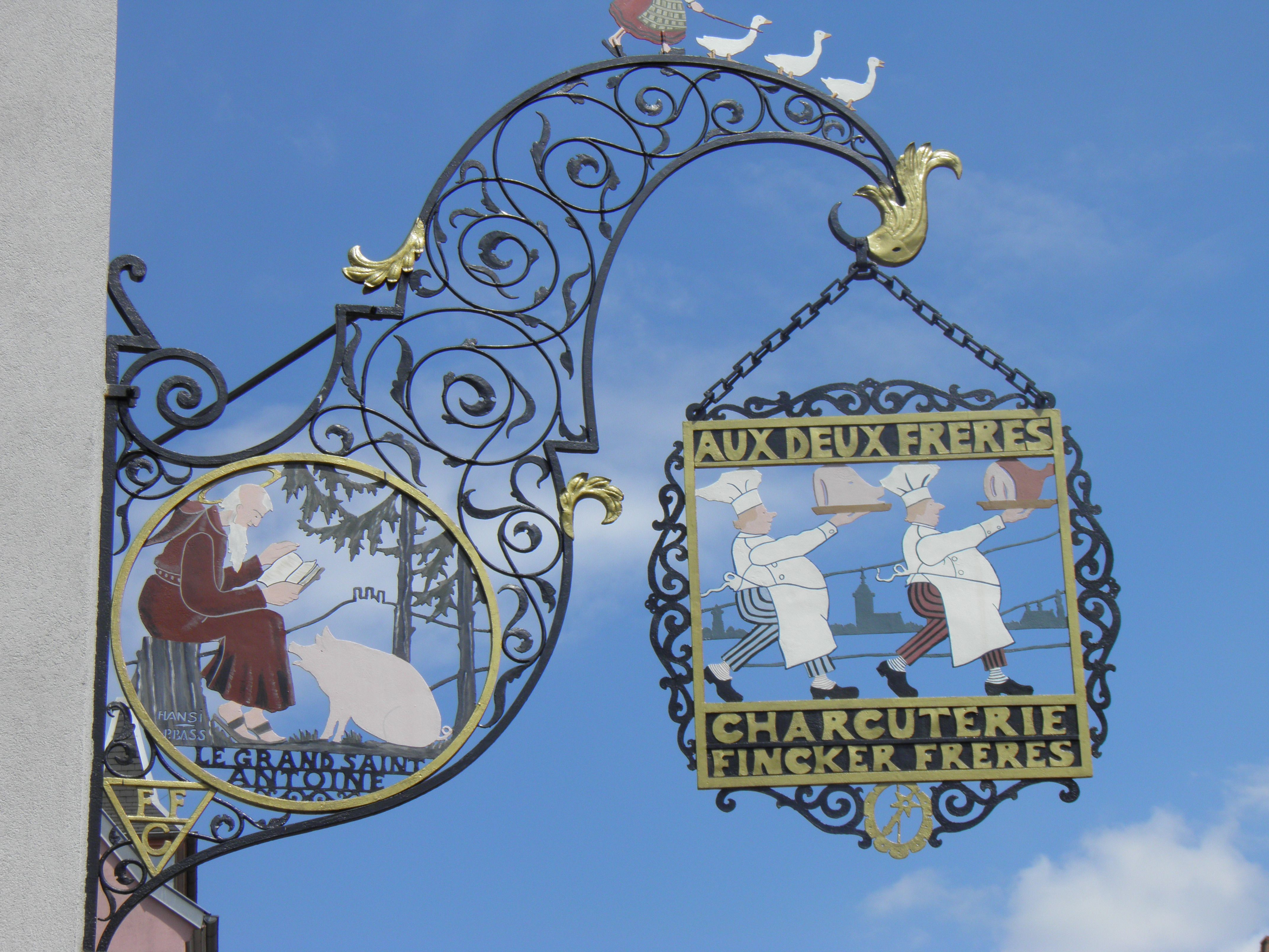 Enseigne de magasin au 22 rue des Têtes à Colmar (Haut-Rhin, France).